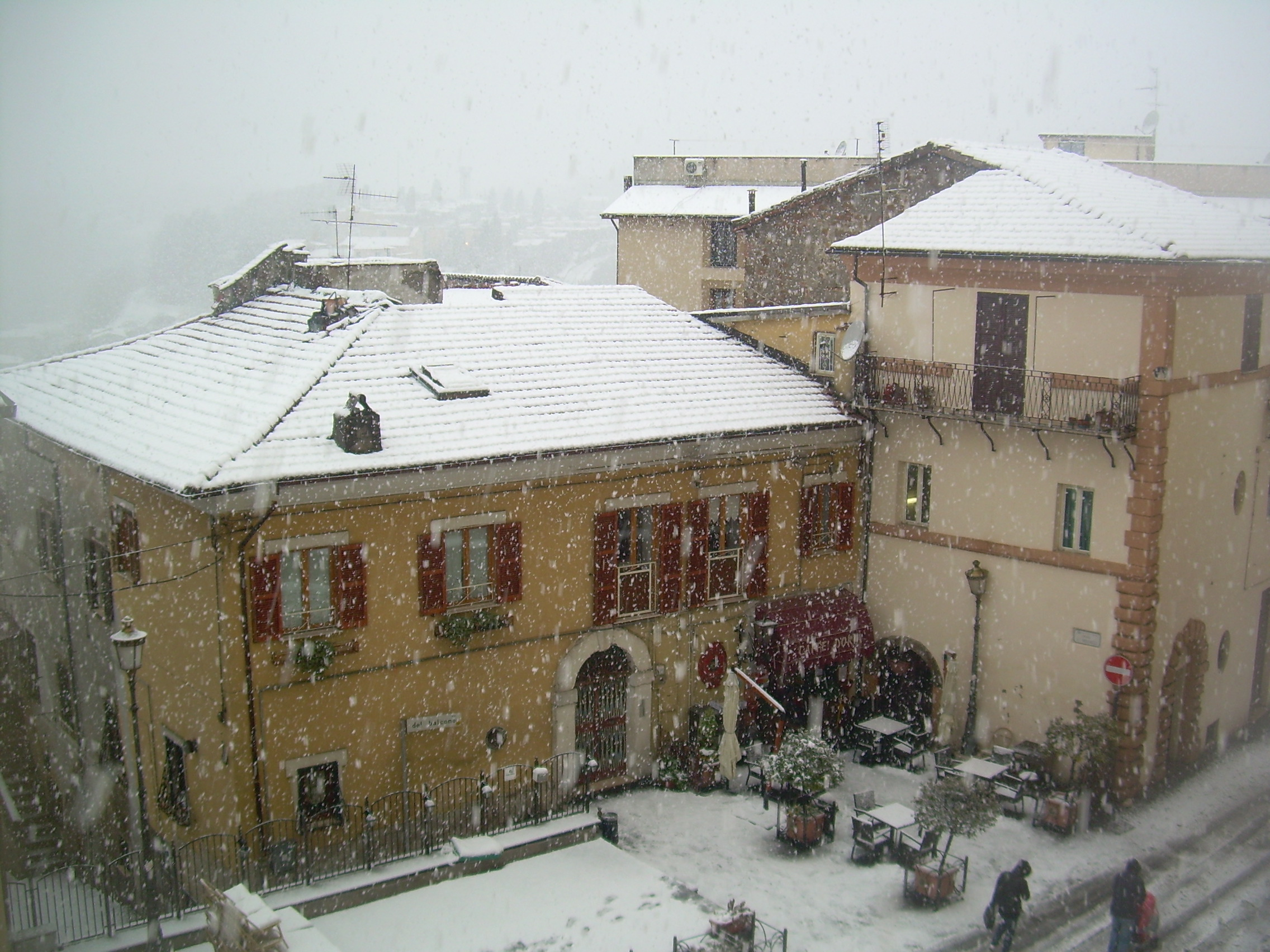 Valmontone sotto la neve (03-02-12)